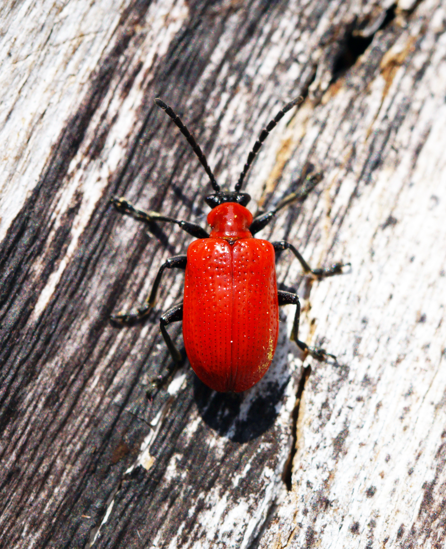 Back Garden - Stevenage - 07/05/16